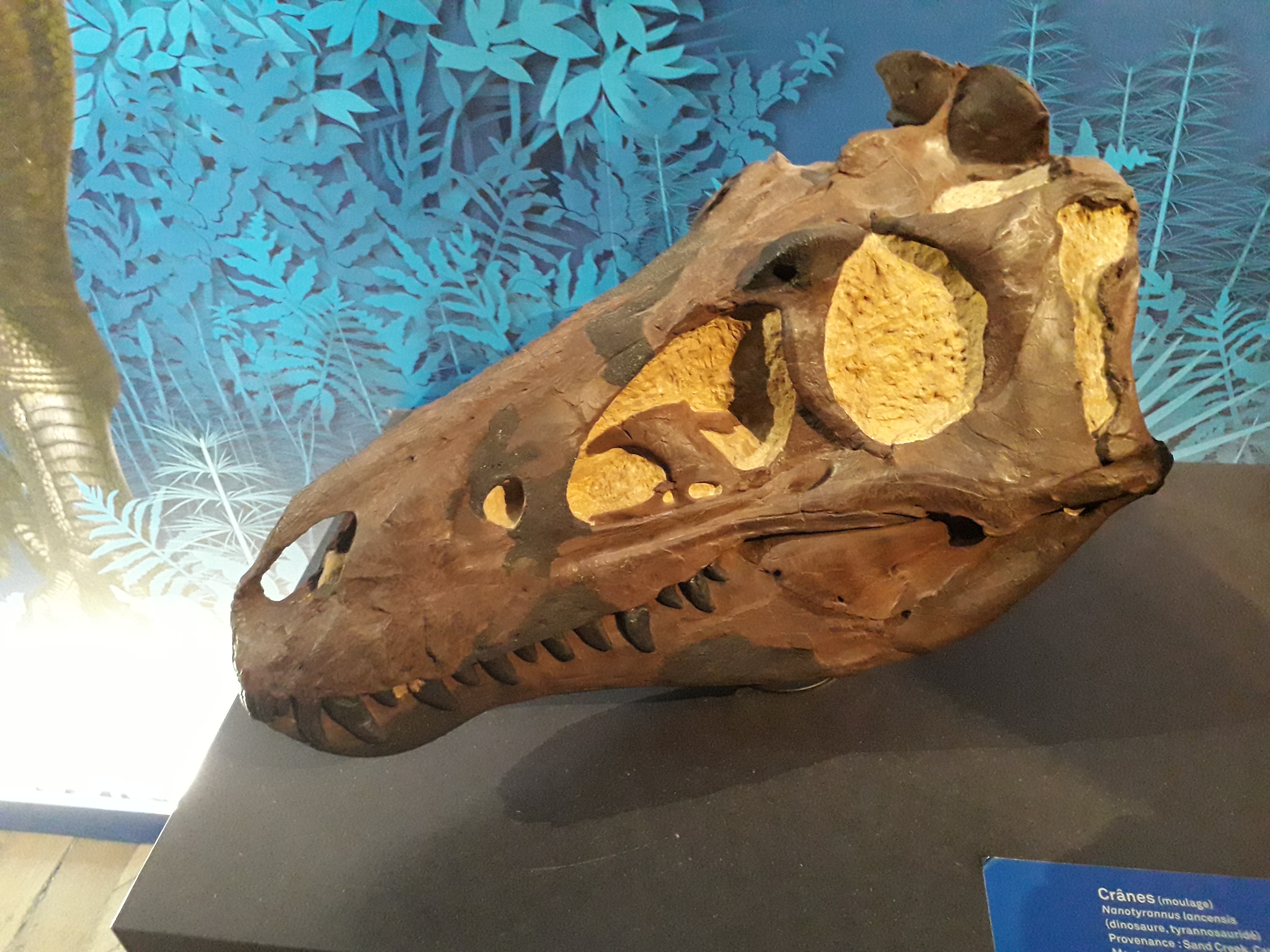 Moulage du crâne d'un Nanotyrannus lancensis (dinosaure, tyrannosauridé). Provenance : Sand Creek, Carter County, dans le Montana, aux Etats-Unis. Date : Crétacé supérieur, période du Maastrichtien, il y a 67 millions d'années. Exposé à l'occasion de l'exposition "Un T-Rex à Paris" au Muséum national d'histoire naturelle de Paris (France) du 6 juin au 2 septembre 2018. Légende de l'objet dans cette exposition : "Espèce à part entière ou crâne d'un jeune Tyrannosaurus rex ? La controverse dure depuis 30 ans. Pour certains paléontologues, quelques particularités anatomiques et le degré de fusion des os du crâne suggèrent que ce crâne appartiendrait à une espèce naine (6 mètres de long) de tyrannosauridé. Pour les autres, il ne s'agit que d'une forme juvénile de Tyrannosaurus rex. L'étude de spécimens inédits devrait bientôt permettre de résoudre cette énigme."